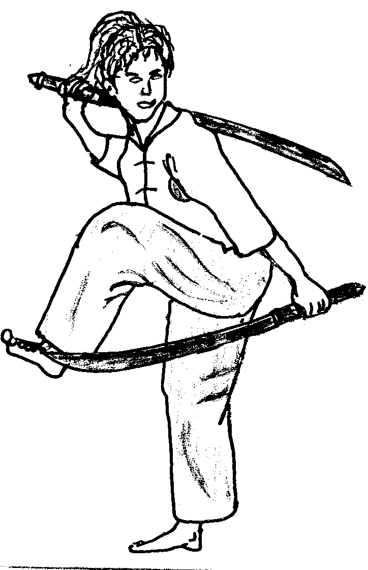 panther_danse.jpg